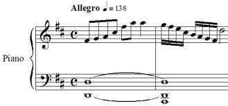 Tempoa